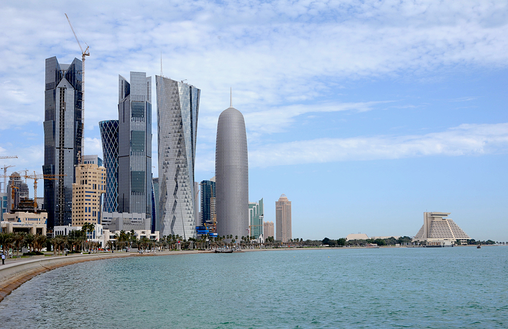 West Bay